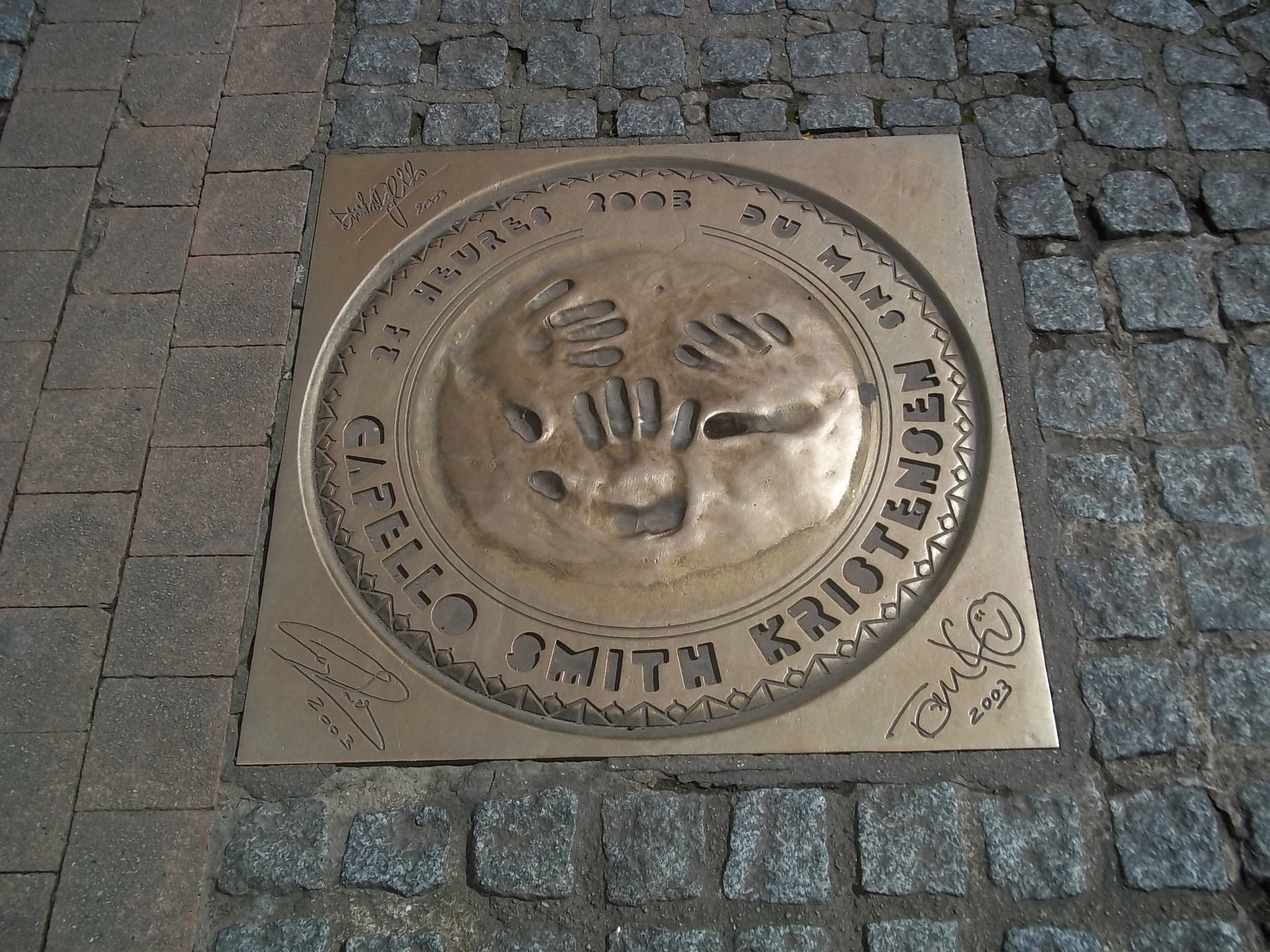 Plaque de bronze des empreintes des vainqueurs des 24 heures 2003